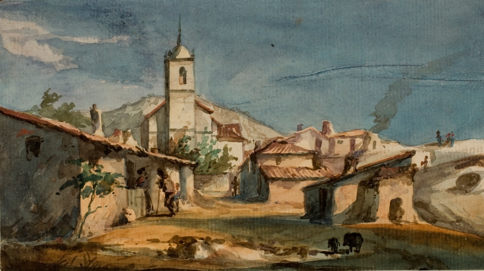 Vista de Zarzalejo con la iglesia de San Pedro Apóstol (1852-1858), de Martín Rico. Acuarela sobre papel verjurado, 101 x 179 mm. Museo del Prado, Madrid, España.